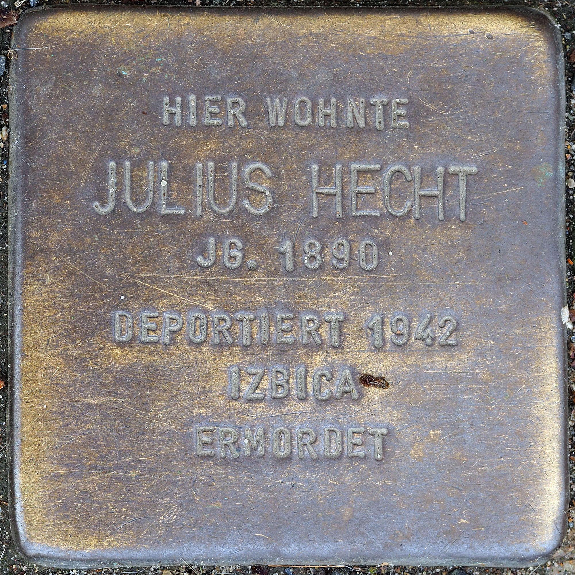 Stolpersteine MG: Hecht, Julius